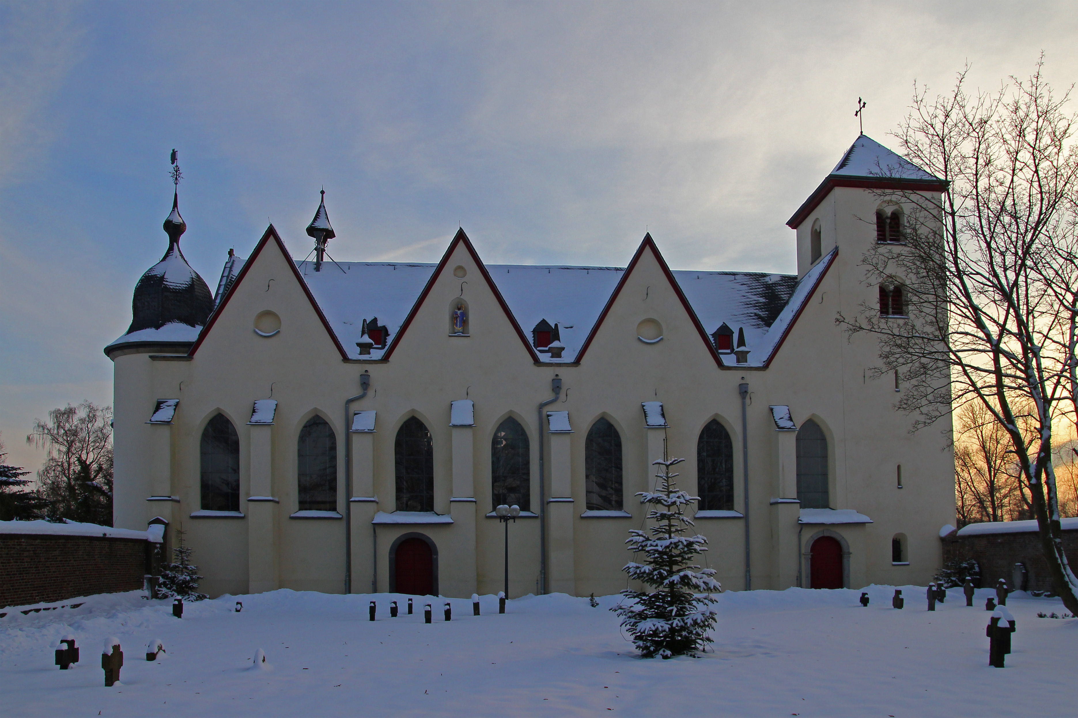 Weiße Weihnachten 2010 in Köln-Dünnwald. Ehemalige Prämonstratenserinnen-Kirche St. Nikolaus.